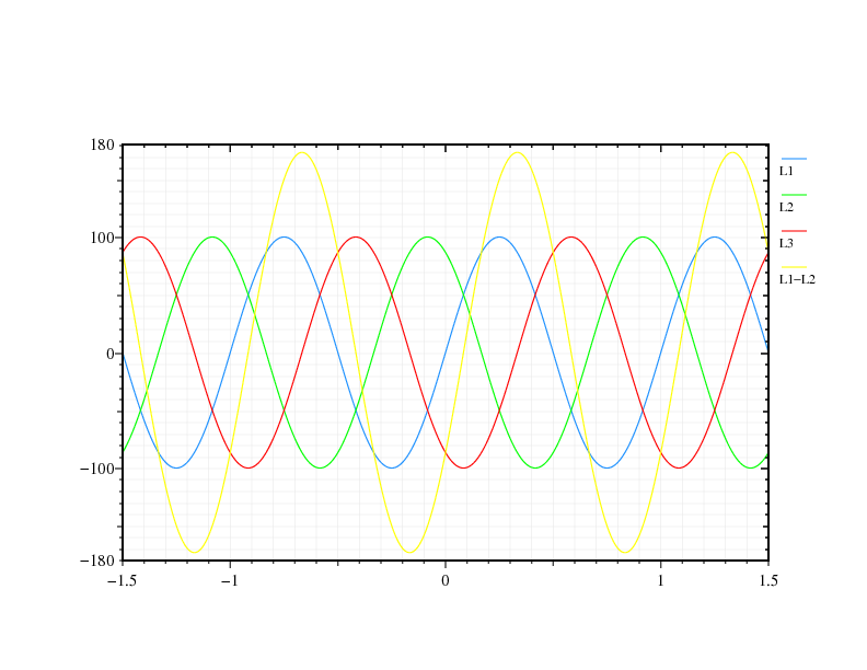 Differenzspannung zwischen zwei Phasen einer Drehstromquelle